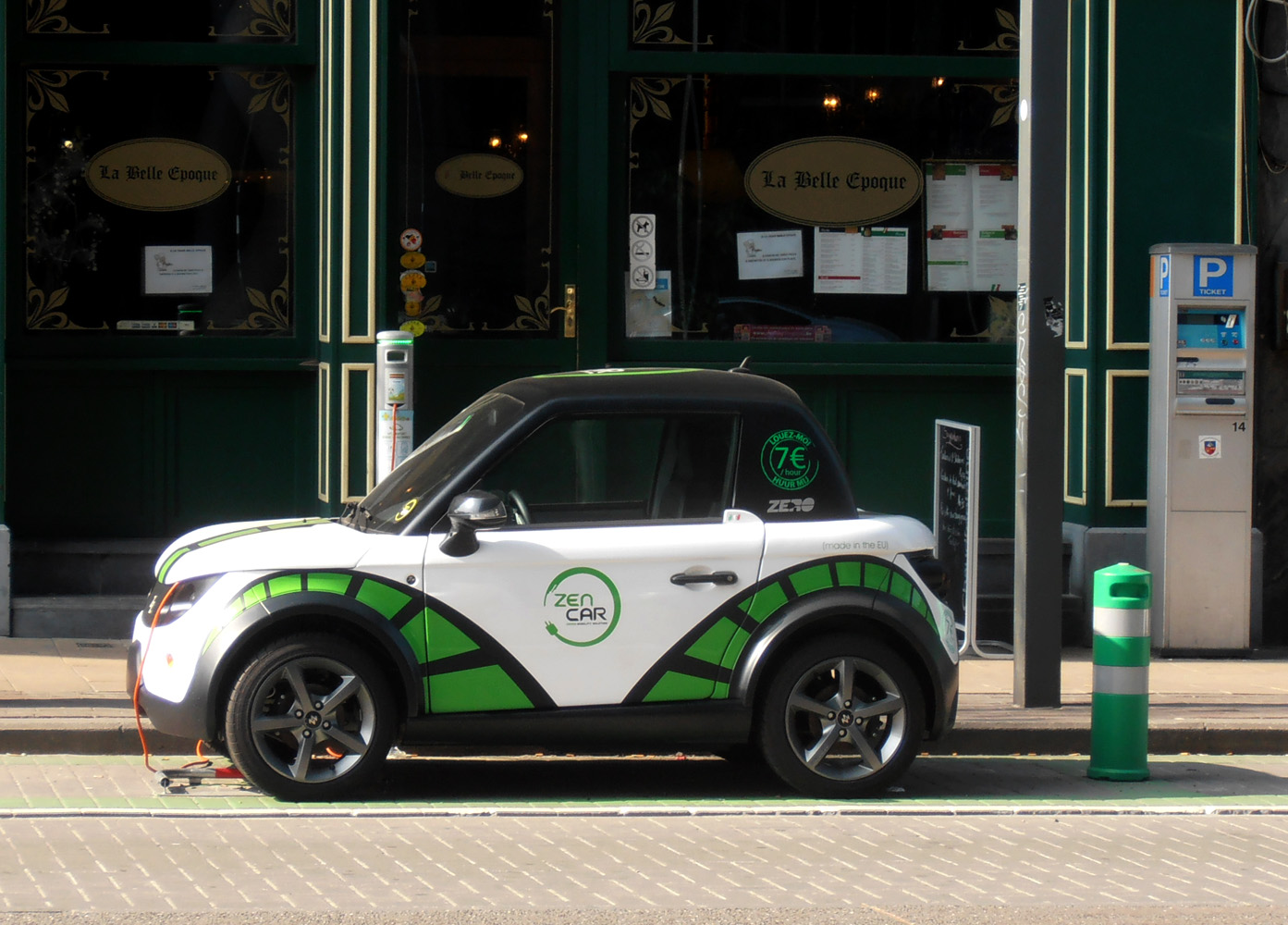 Tazzari Zero van Zencar